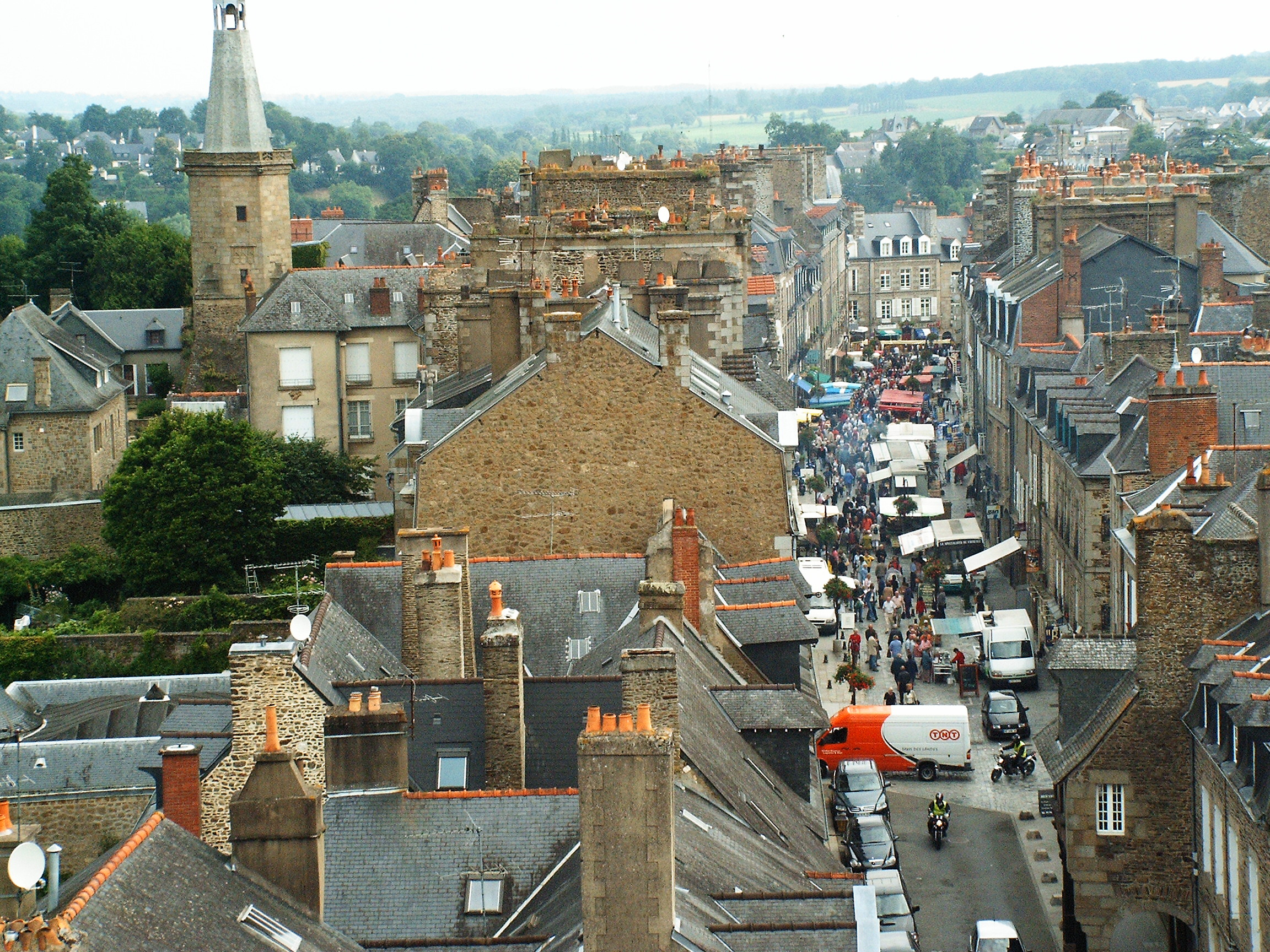 Marché Rue Nationale à Fougères (35) vu du clocher de l'église Saint-Léonard.Fougères - Blick von der Kirche St.Léonard auf den Markt